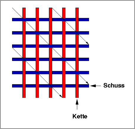 Prinzip der Koeperbindung